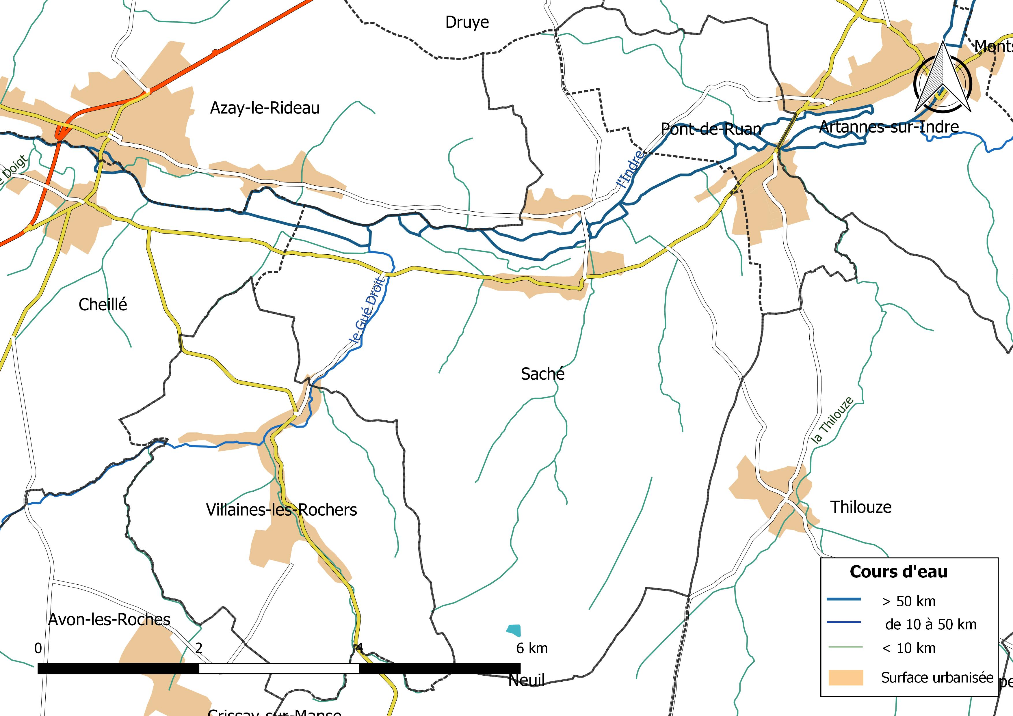 Carte du réseau hydrographique de la commune de Saché (France).